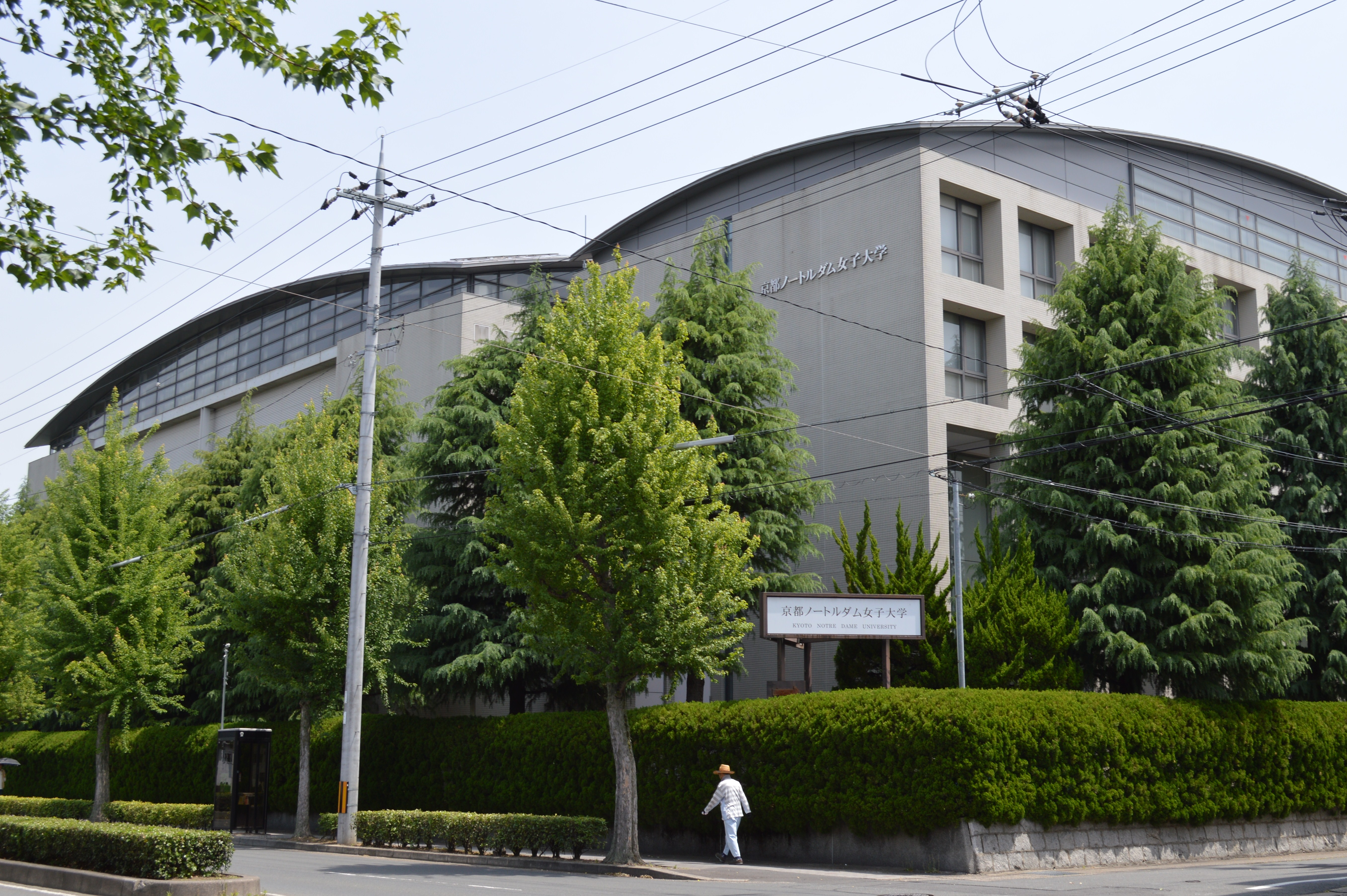 京都市左京区下鴨 学校法人ノートルダム女学院の京都ノートルダム女子大学ユニソン会館 下鴨本通を挟んで撮影